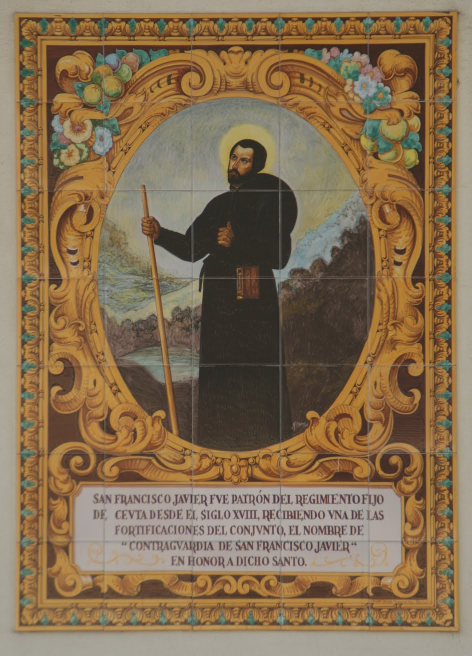 Mosaico situado en uno de los lados del Cristo del Puente con la inscripción "San Francisco Javier fue patrón del Regimiento Fijo de Ceuta desde el siglo XVIII, recibiendo una de las fortificaciones del conjunto el nombre de 'contraguardia de San Francisco Javier' en honor de dicho santo".